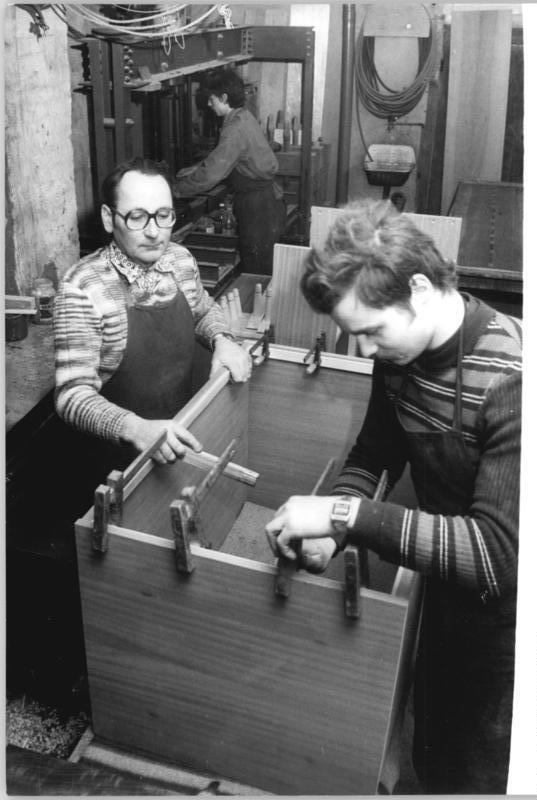 Lychen, Tischlerei, Werkstatt ADN-ZB Bartocha 12.2.85 Bez. Neubrandenburg: Abgeordneter (NDPD)- Tischlermeister Horst Jähnke (l.) hat sich in seiner Heimatstadt Lychen einen Namen gemacht. So manche Tür und so manches individuell angefertigte Fenster zeugen von der Qualitätsarbeit dieser seit 1872 bestehenden Handwerkerfamilie. Neben Reparatur- und Dienstleistungen bietet der Tischler seinen Kunden auch als Service die Anfertigung von Ergänzungsmöbeln an. Neffe Heiko Jähnke geht ihm dabei zur Hand. Als langjähriger Abgeordneter des Bezirkstages leistet Horst Jähnke in der Kommission Wohnungspolitik eine hervorragende Arbeit. Hauptschwerpunkte sind hier Fragen der Instandhaltung, Modernisierung und Werterhaltung, wobei sein fachlicher Rat stets gefragt ist.